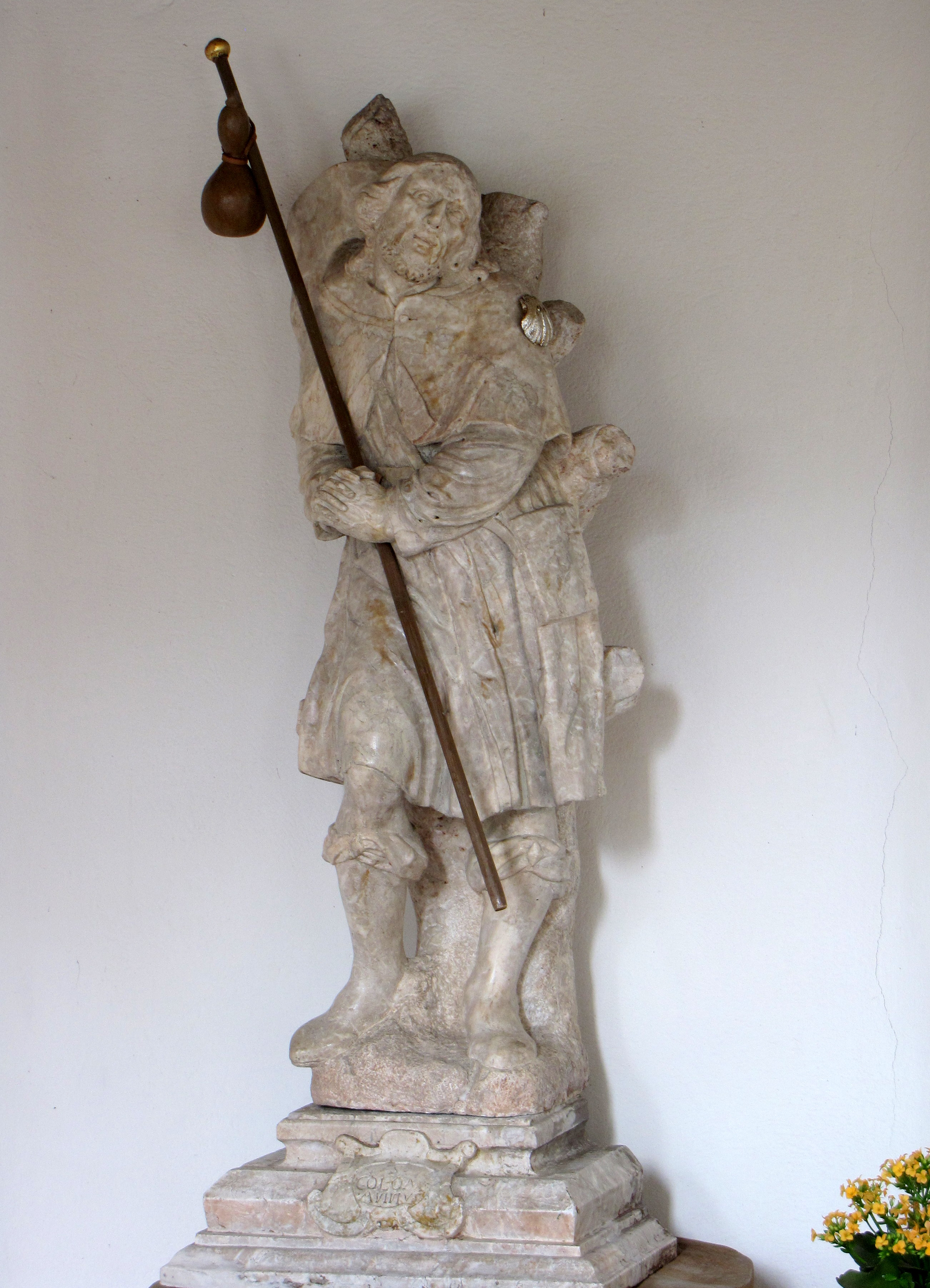 Statue des Hl. Koloman von Maximilian Hitzelberger in der Filialkapelle Pfronten-Ösch